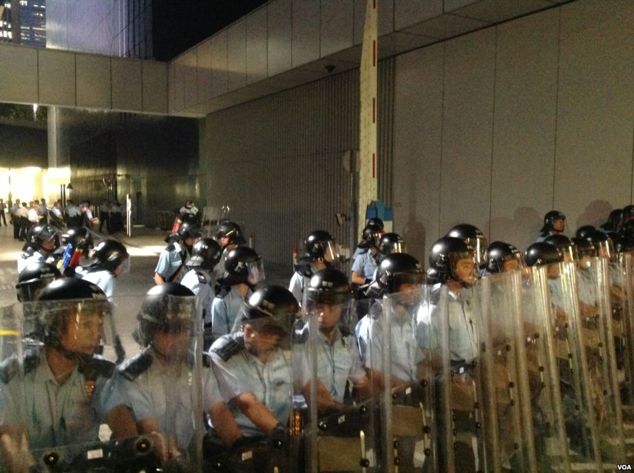 中文（台灣）: 港警方清場公民廣場 外界批使用過分武力